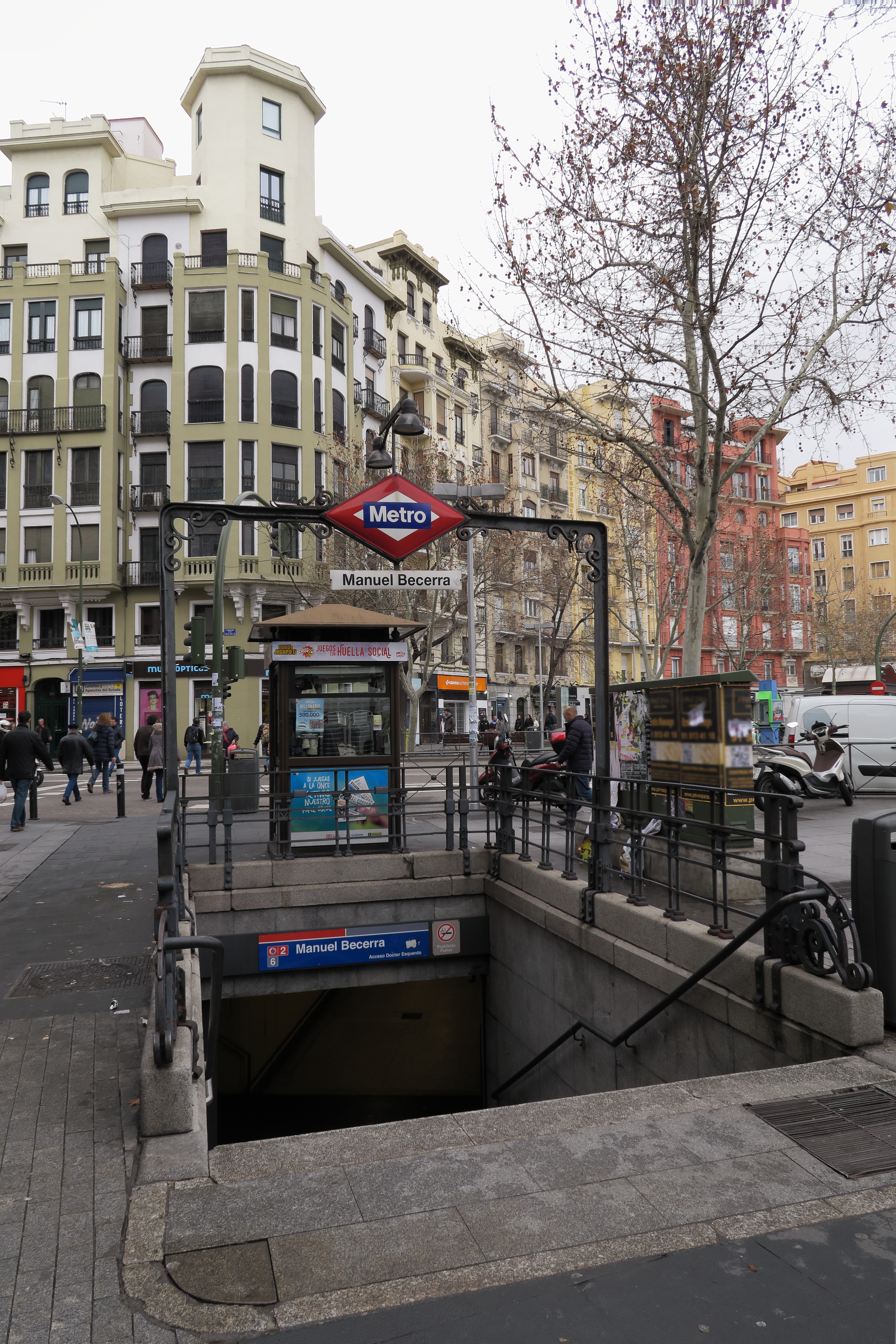 Estación de Manuel Becerra